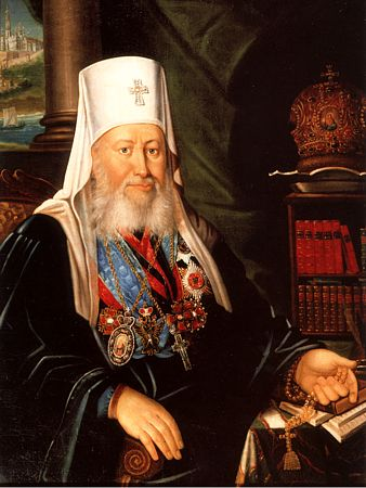 митрополит Киевский и Галицкий Евгений (Боловитинов). 2-я четв. XIX в. (ГИМ)